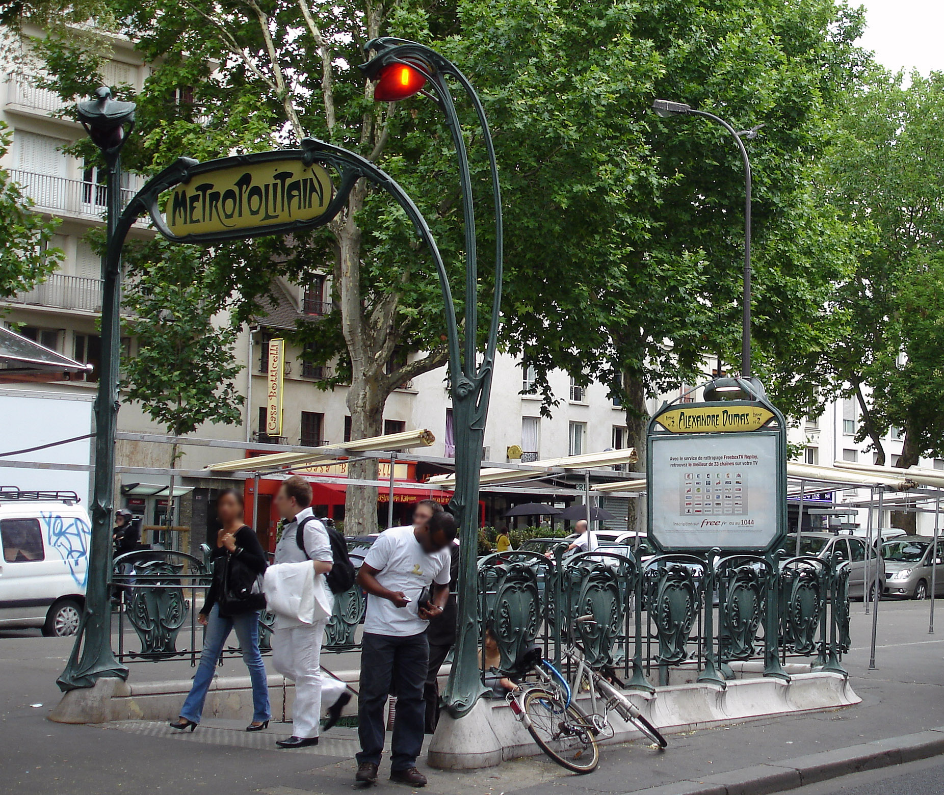 La station Alexandre Dumas de la ligne 2 du métro de Paris, France